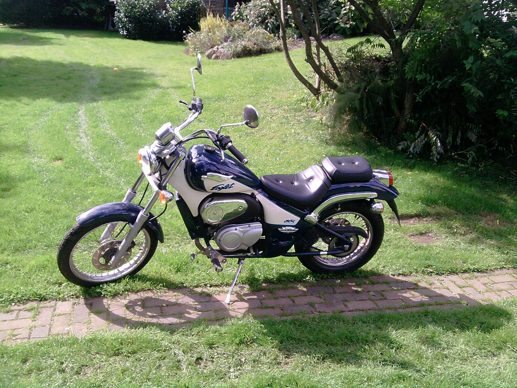 Eine Gilera Eaglet aus dem Jahr 1995. Das Foto ist eine Privataufnahme.